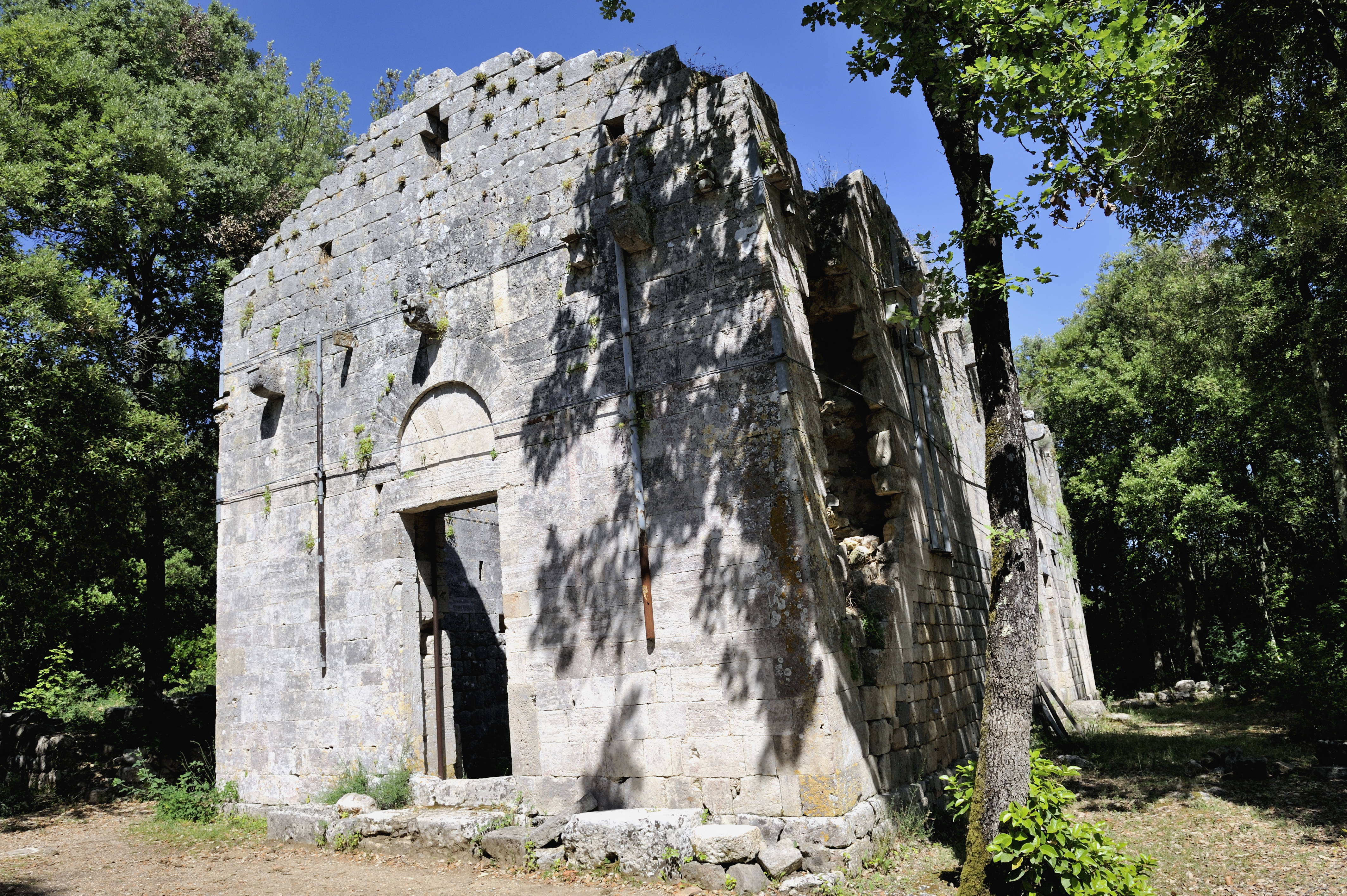 Facciata della chiesa dei Santi Frediano e Giovanni a Castelvecchio di San Gimignano - Siena